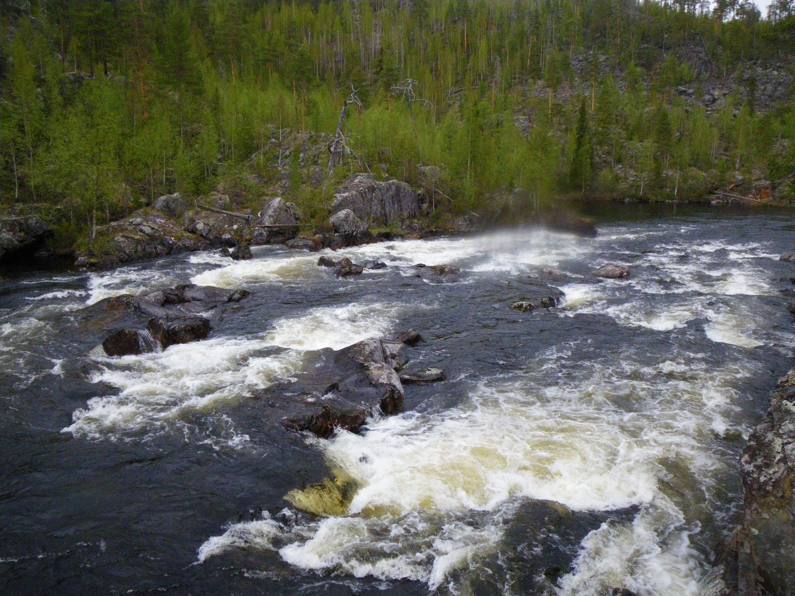 р.Кутсайоки, п.БСТ